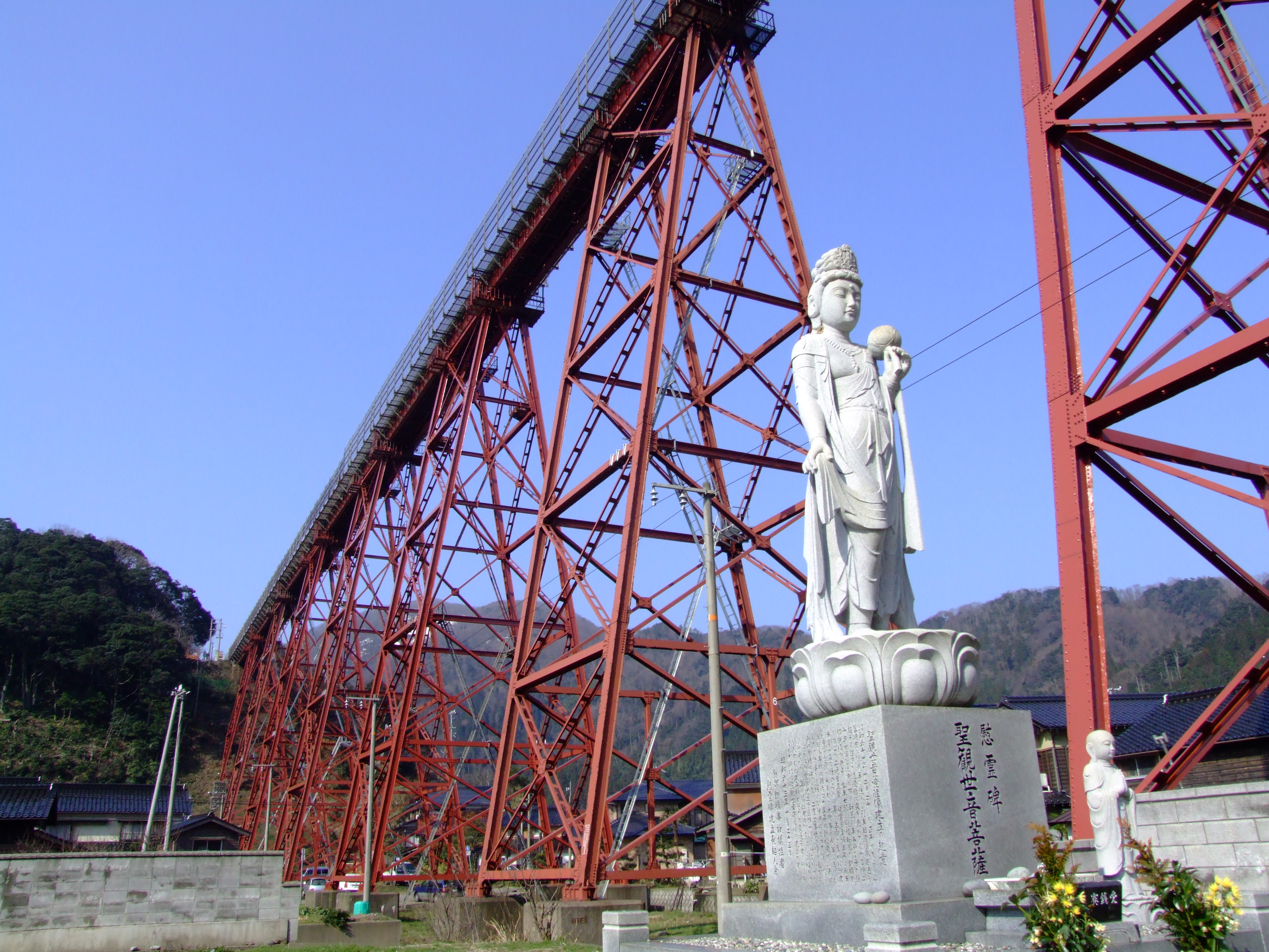 餘部鉄橋下の慰霊碑